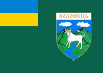 прапор містечка Воловець